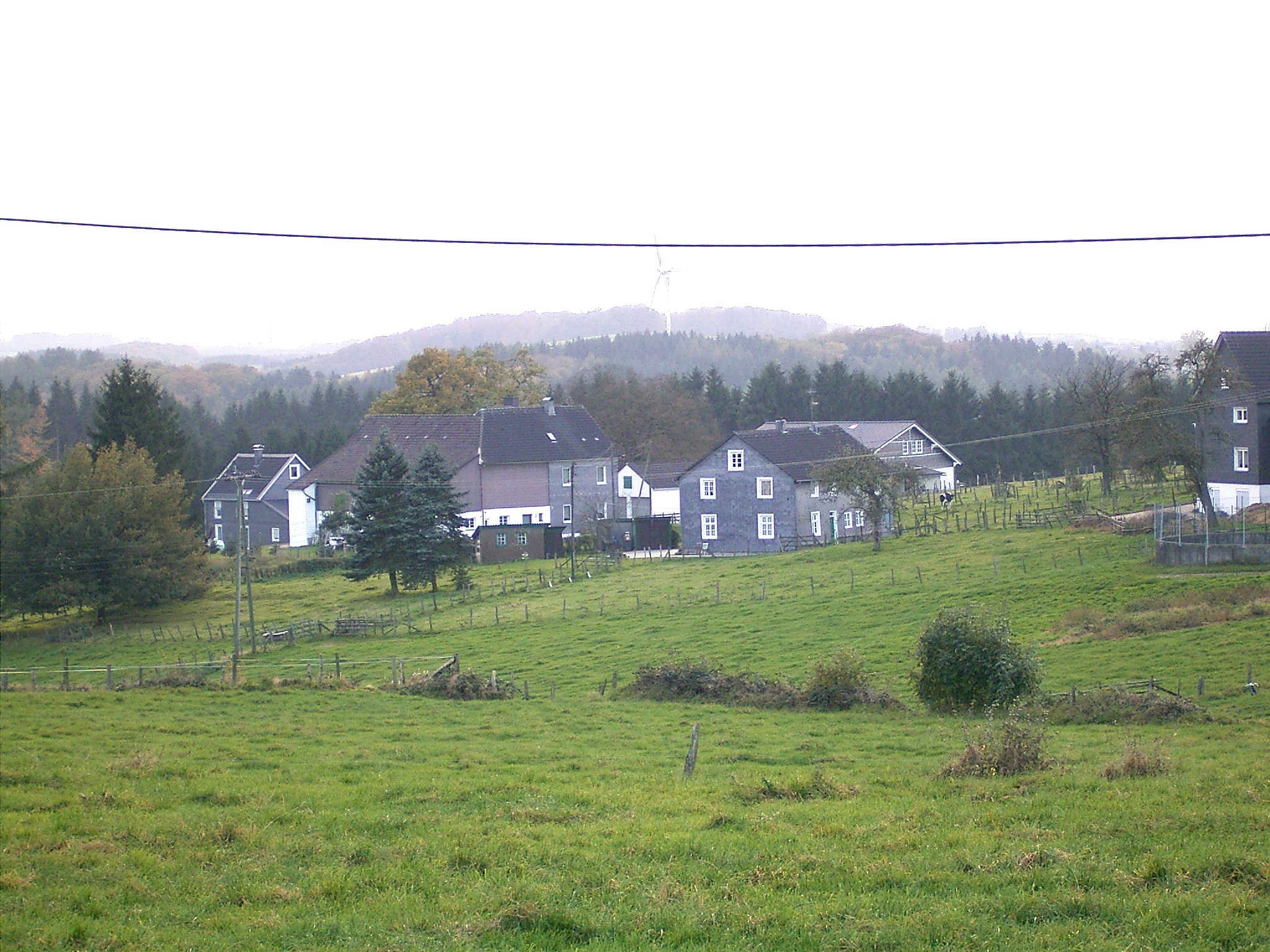 Radevormwald